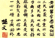 中文（台灣）: 孫中山手書黃埔軍官學校訓詞